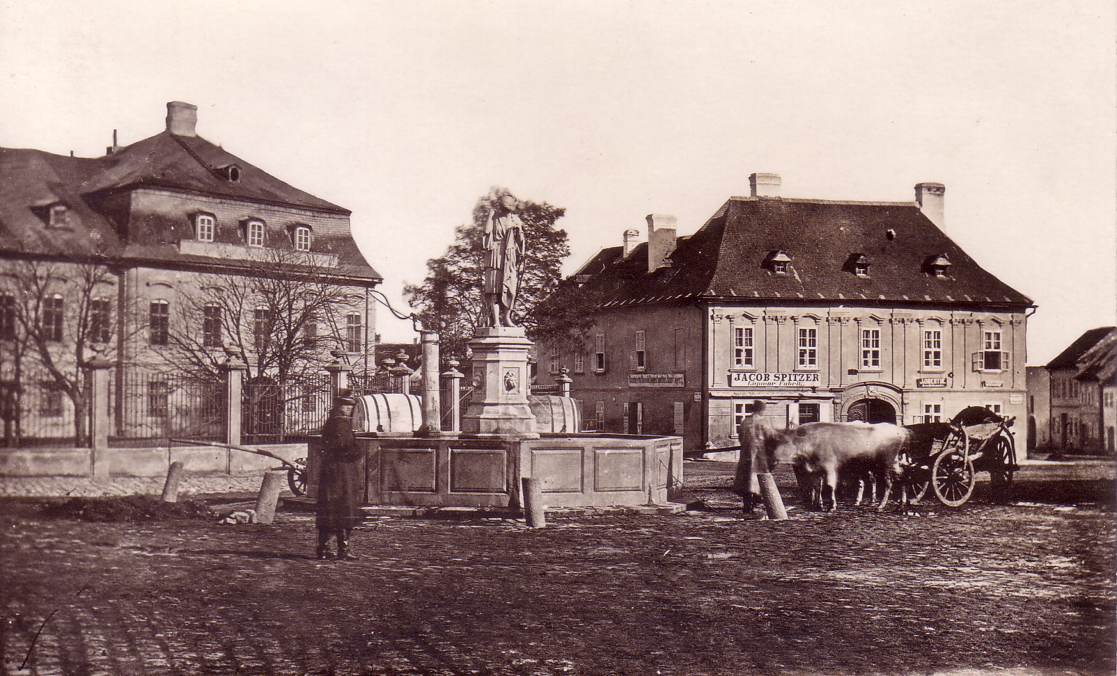 Der Artemisbrunnen am Grassalkovichplatz (heute Hodza-Platz) um das Jahr 1884; links das Erzherzog Friedrich Palais. Aufnahme von Karl Körper, Preßburg. (Privatarchiv Anton Klipp, Wiesbaden)